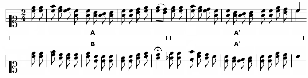 Mesures de la Fantaisie chorale de Beethoven (1808)